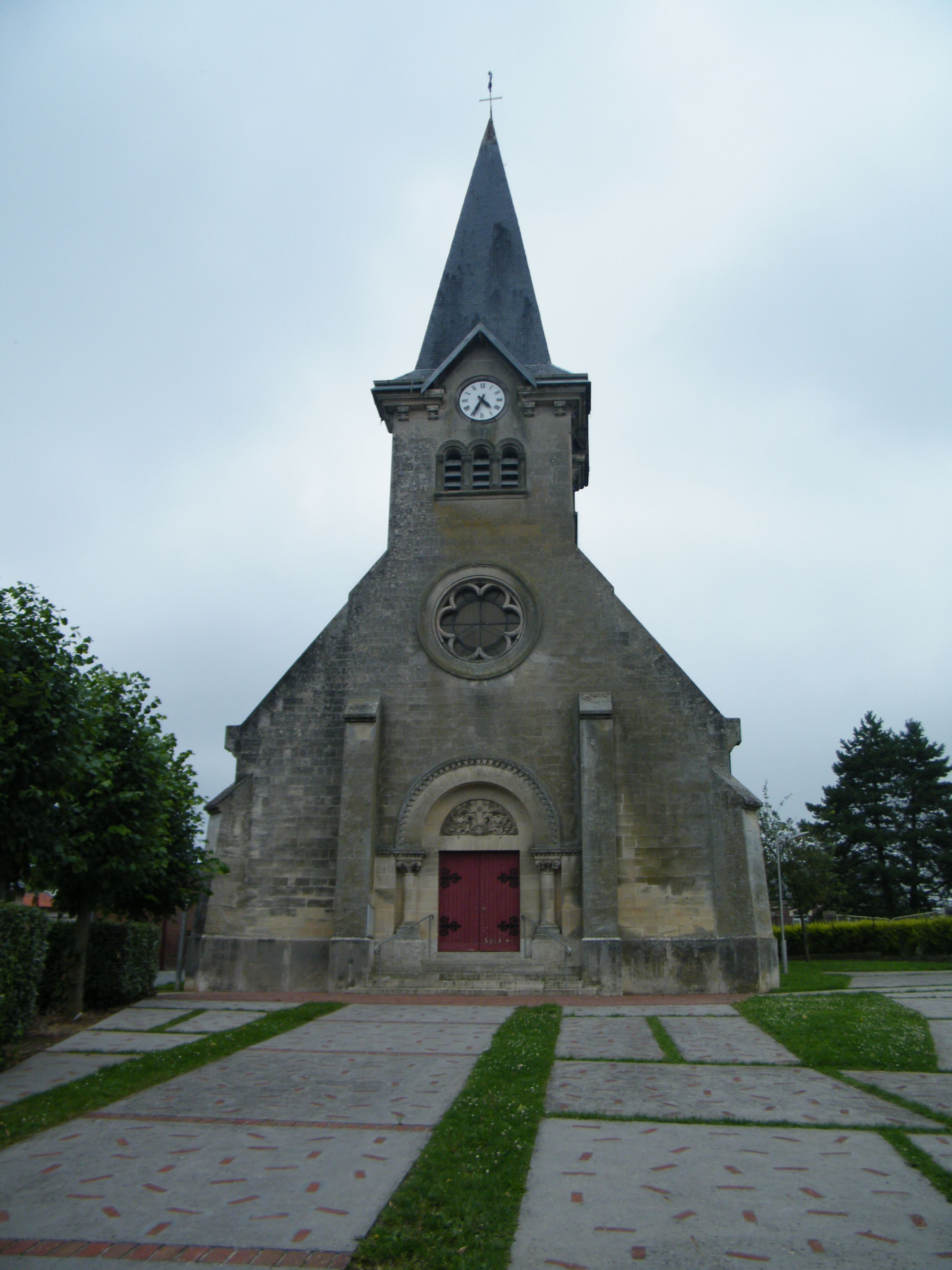 Eglise.